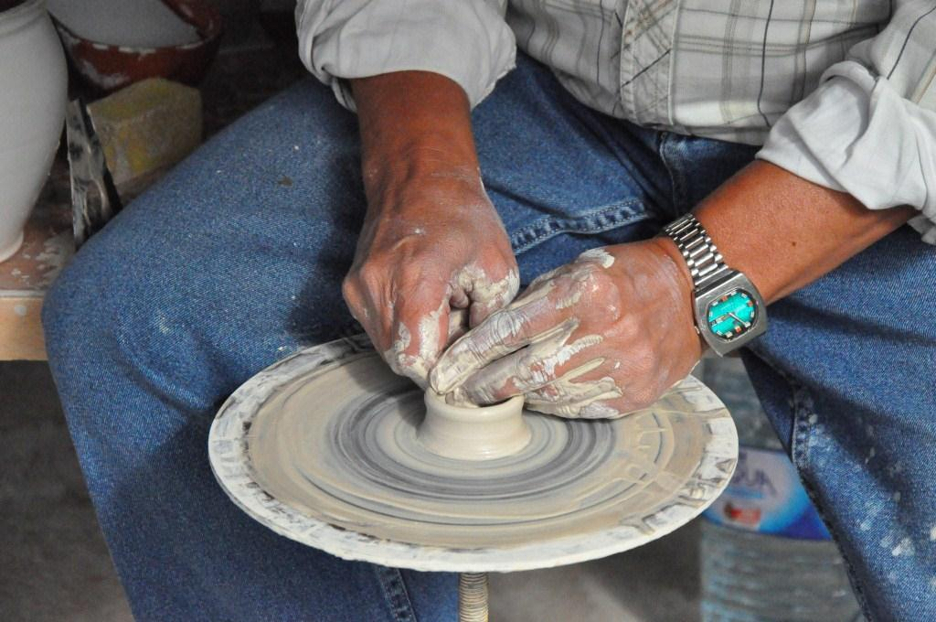 Garncarz przy pracy, 2012